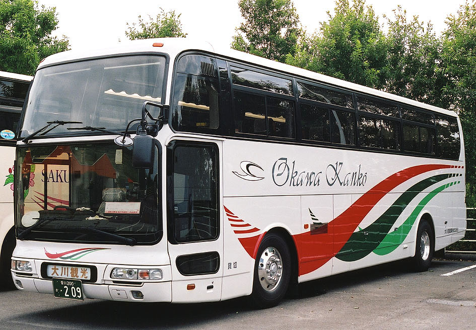 大川自動車 三菱ふそう エアロクィーンII KL-MS86MP